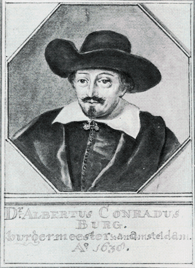 Afbeelding Albert Burgh in 1638.